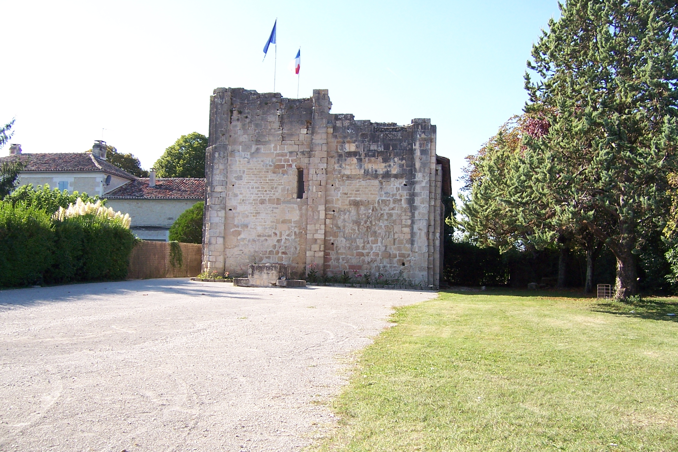 France - Charente - Montignac - Le donjon